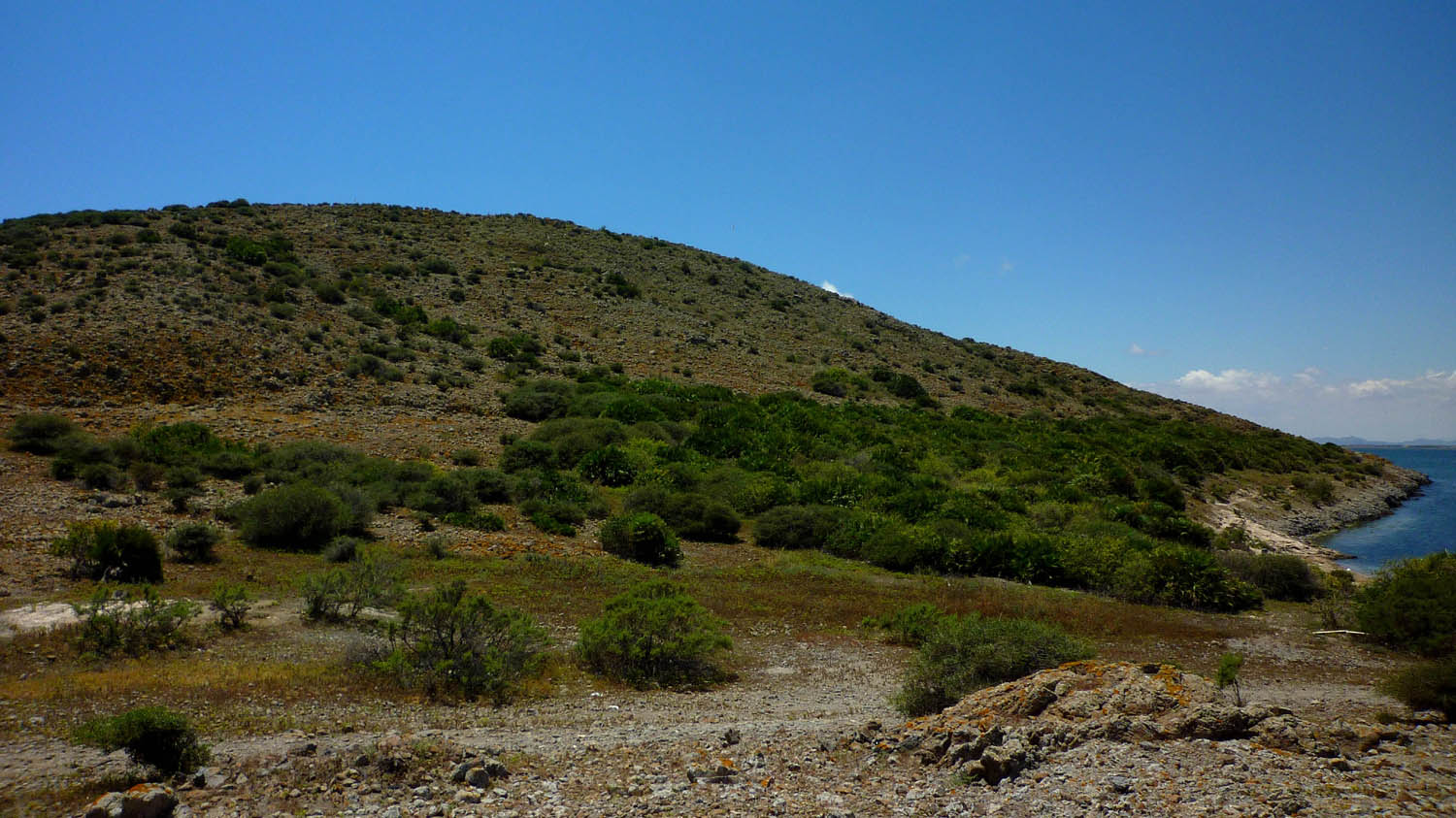 Isla del Ciervo en Cartagena (España)